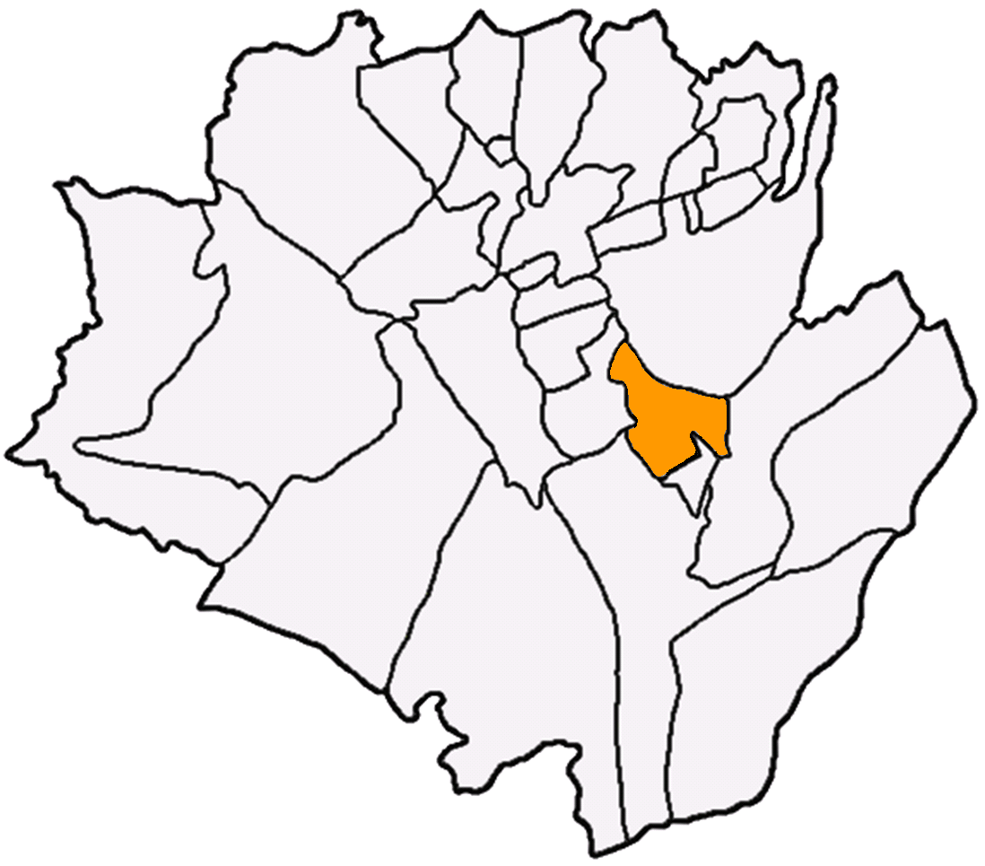 富林里在龍潭區 (台灣)中的位置